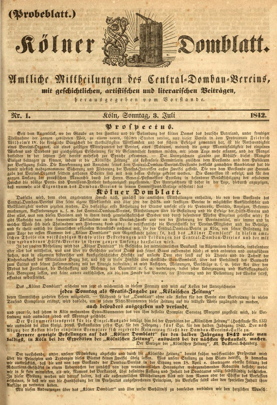 Kölner Domblatt: amtliche Mittheilungen des Central-Dombau-Vereins: Alphabetisch geordnetes Inhalts-Verzeichniß zum Kölner Domblatt von 1842-1857